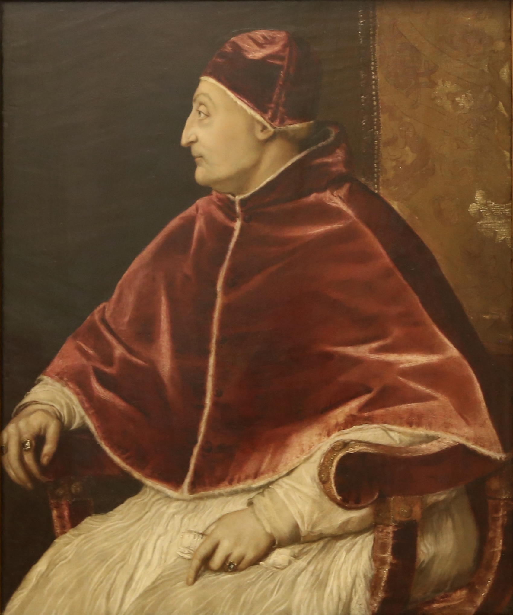 Tizian: Portrait Papst Sixtus IV, ca. 1545-46, Uffizien, Florenz